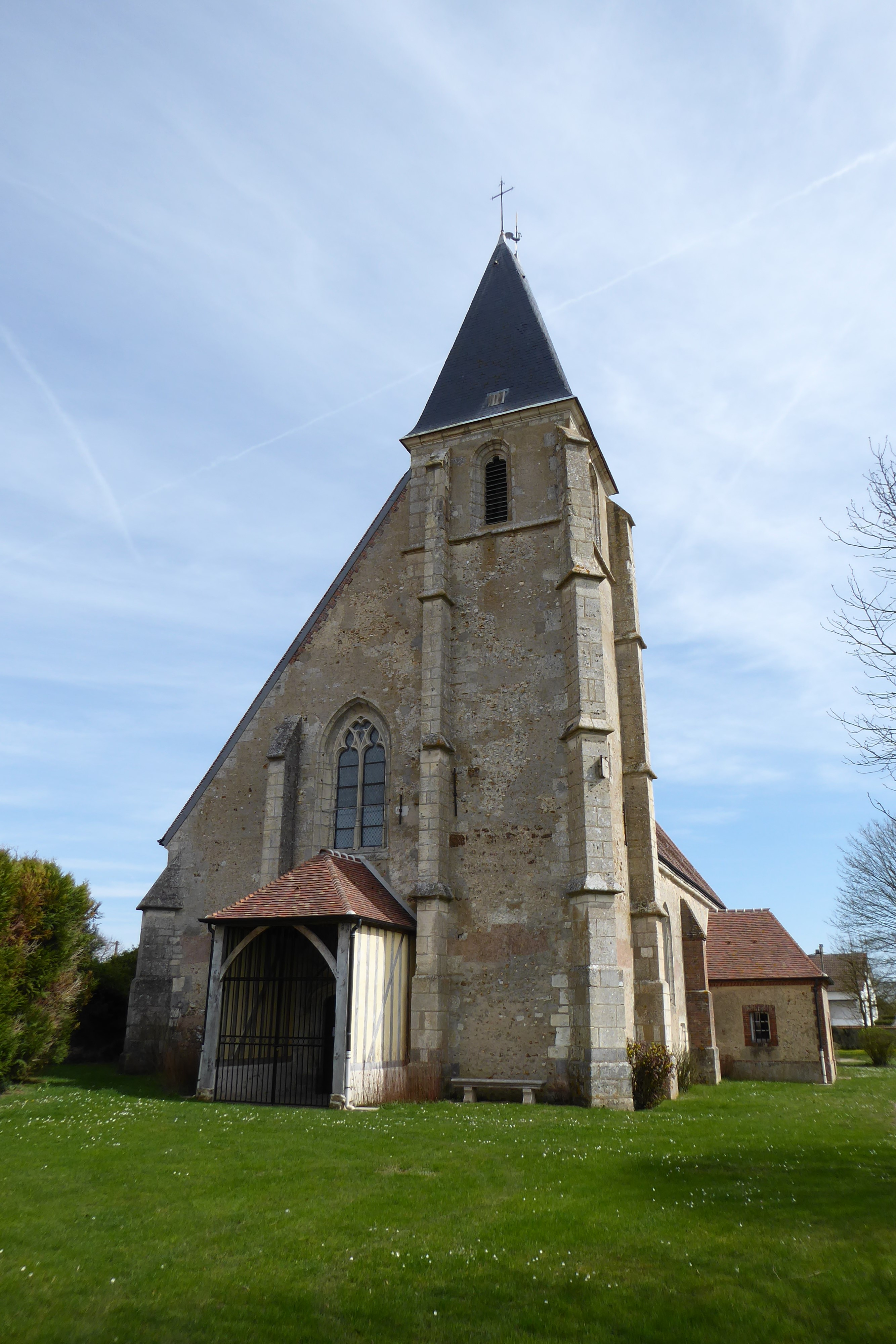 façade ouest de l'église Saint-Martin, Garancières-en-Drouais, Eure-et-Loir, France.